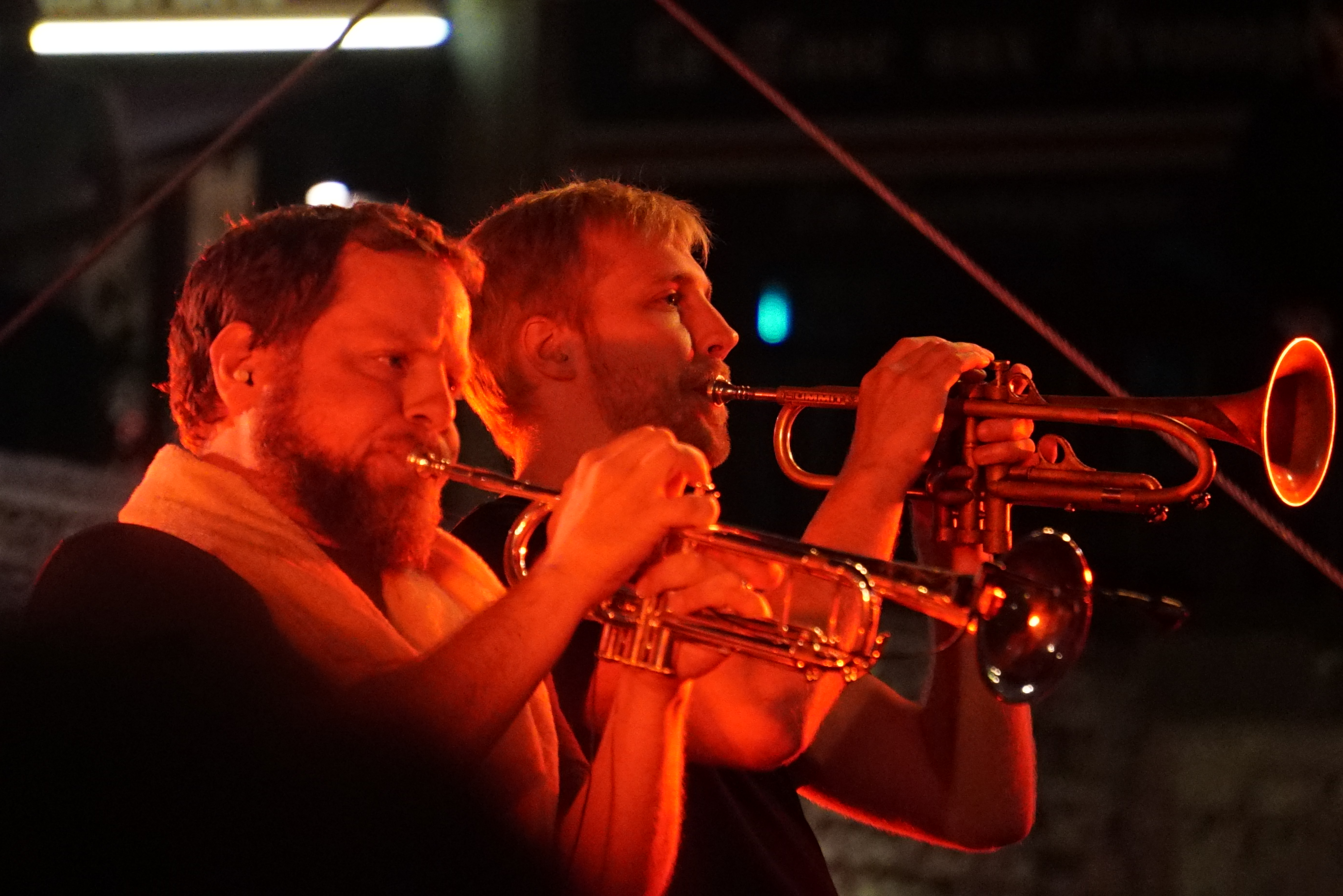 les Youngblood Brass Band à Reims.